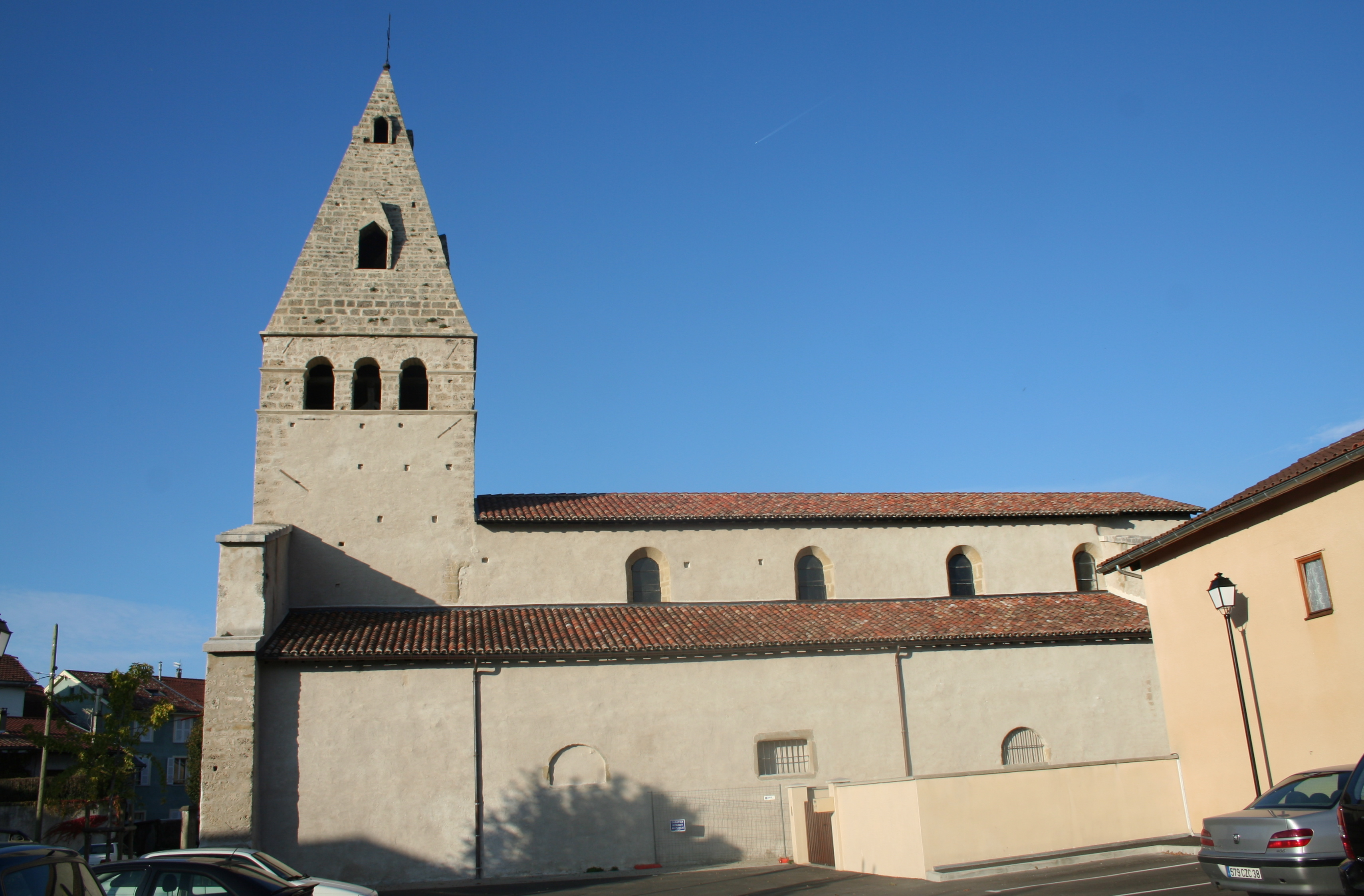 Moirans (Isère) - Ancienne église Saint-Pierre.